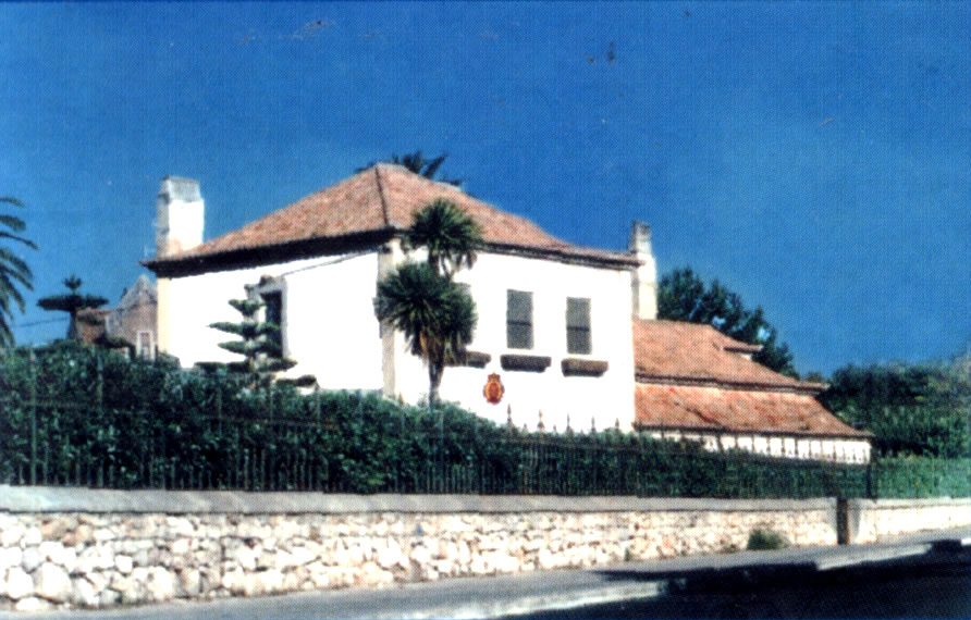 ALA - Academia de Letras e Artes - Portugal Av.ª Rei Humberto II de Itália, Casa do Guarda - 1.º andarPT-2750-641 CASCAISTel./Fax: 214 862 069